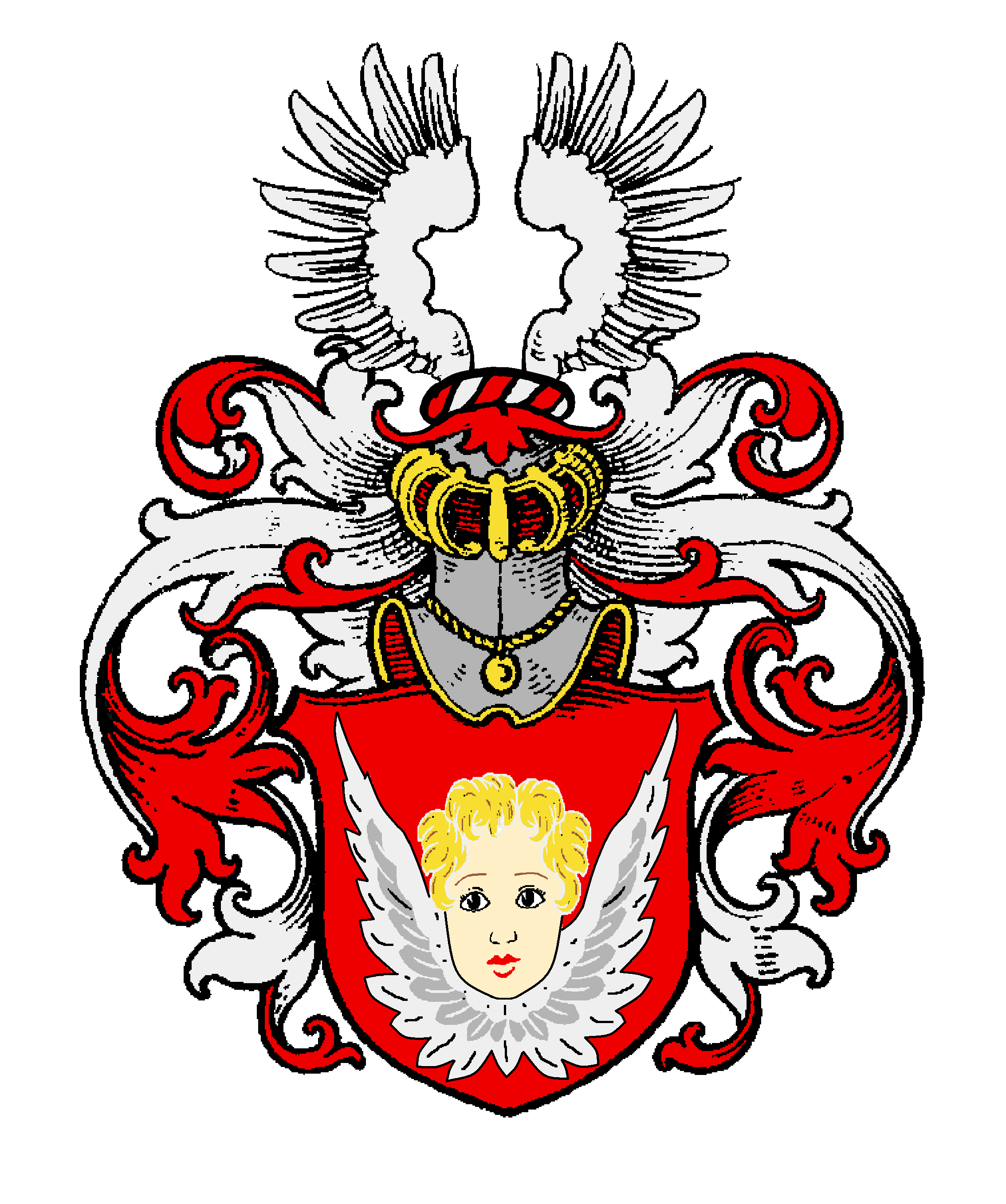 Wappen der Engelbrecht, einer ursprünglich thüringischen Familie, an die mehrfach Nobilitierungen ergangen sind, die sich später weit verzweigte und ausbreiten konnte und zu einigem Ansehen gelangte. Zweige der Familie bestehen bis heute fort.